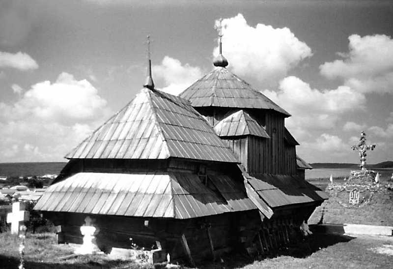 Кліщівна (Рогатинський район Івано-Франківської області). Церква св.Миколи